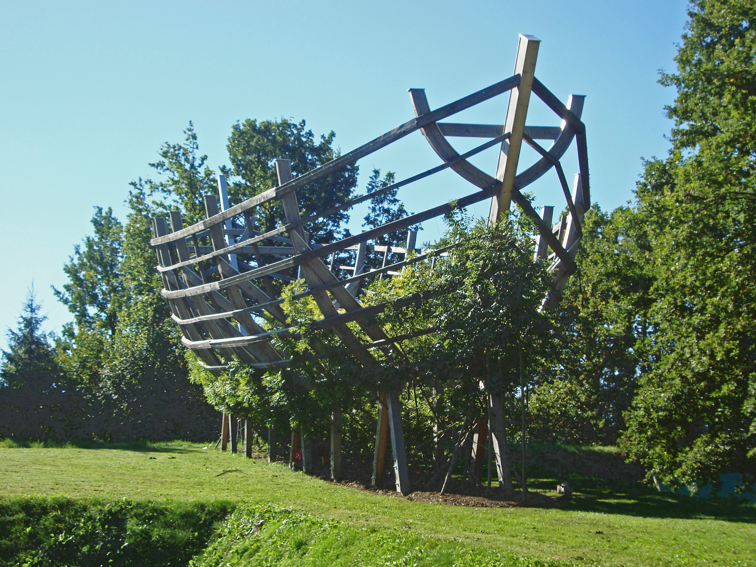 Mario Terzics "Arche aus lebenden Bäumen" im Skulpturenpark Unterpremstätten im Sommer 2013.